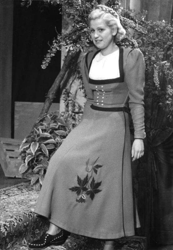 Leipziger Herbstmesse, Modell "Gundel" Illus- "Gundel", Winterdirndel m. Adlerstickerei, Modell: VVB, Konfektion I u. II, Auerbach/Vogtl. - Halle/Sa. Leipziger Herbstmesse 1949